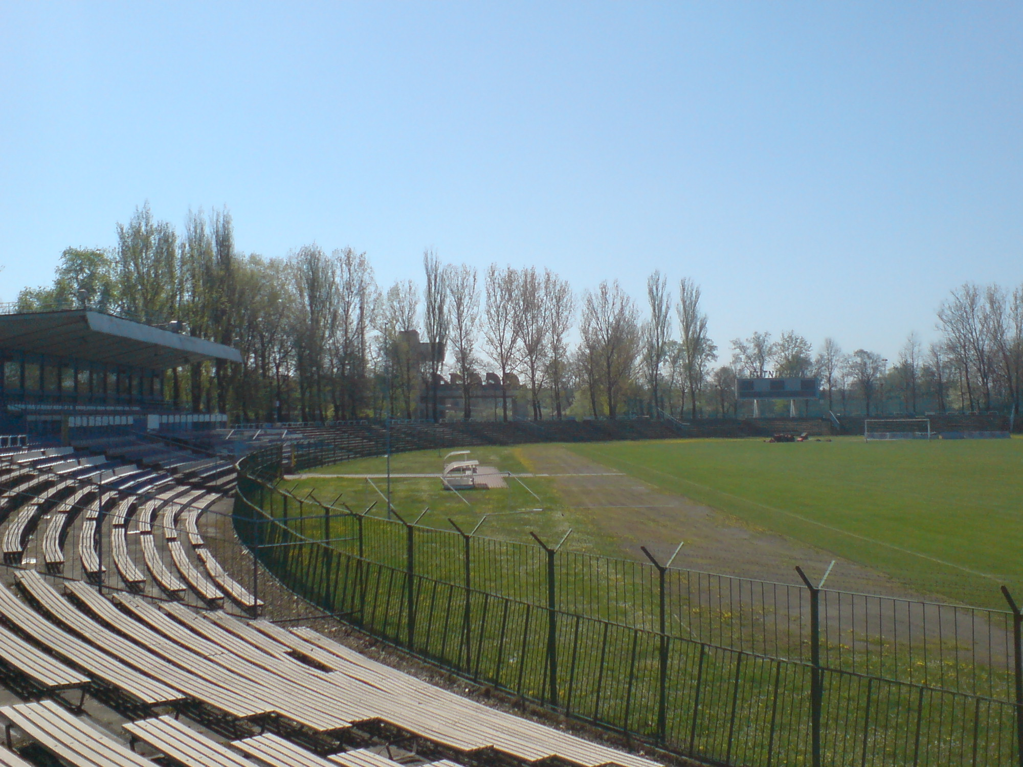 Stadion Hutnika Kraków